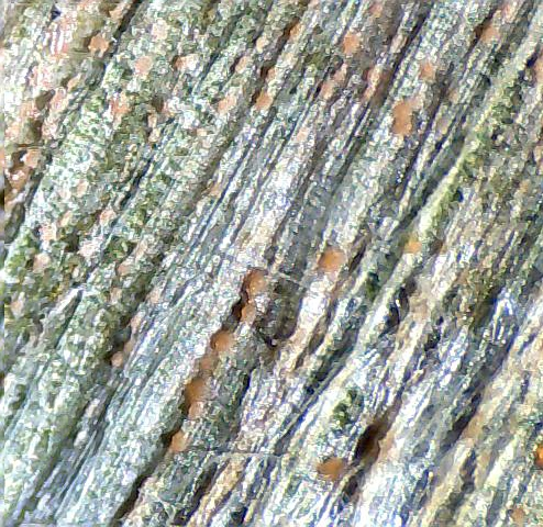 plíseň sněžná, Brno Komín, jaro 2013